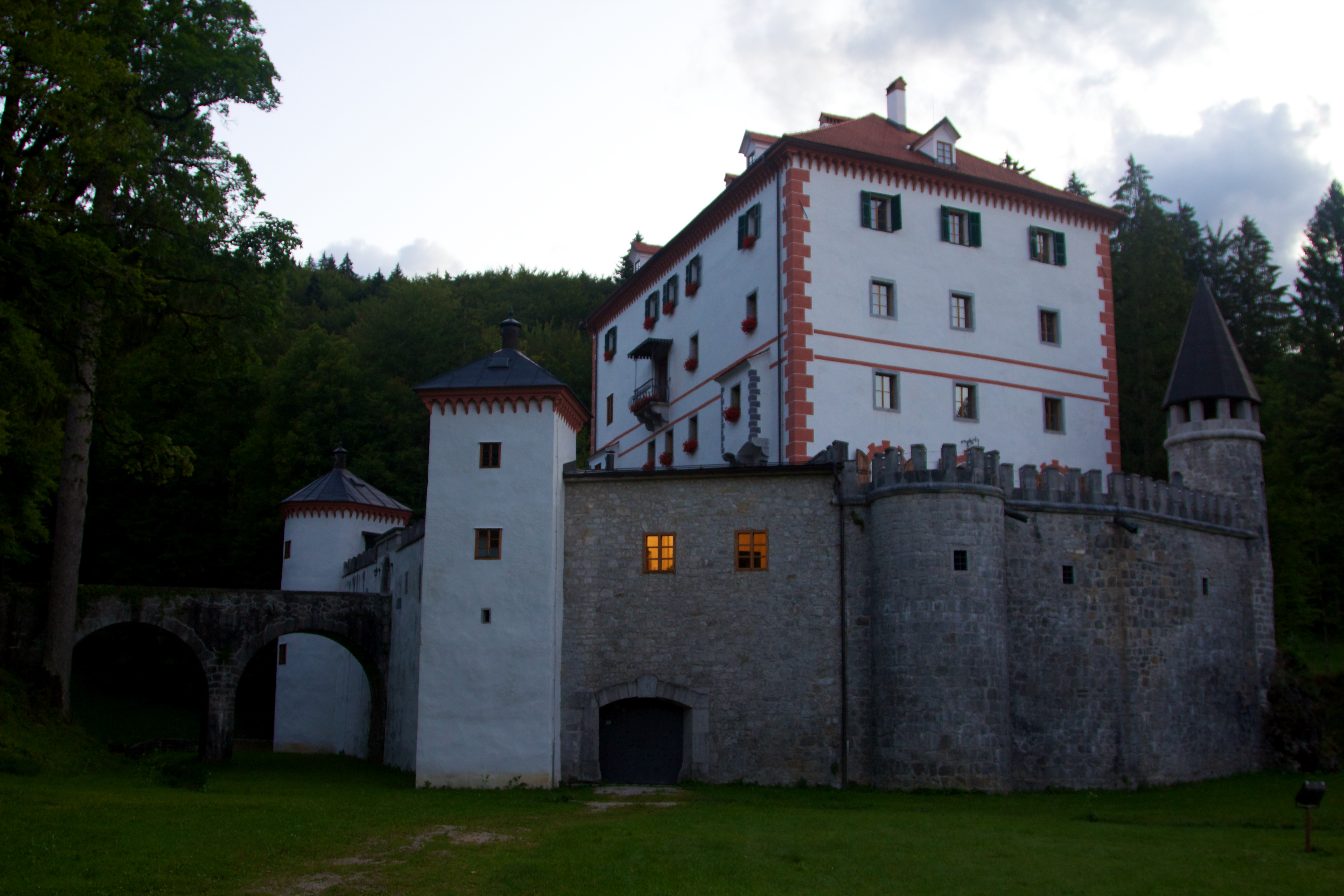 Grad Snežnik